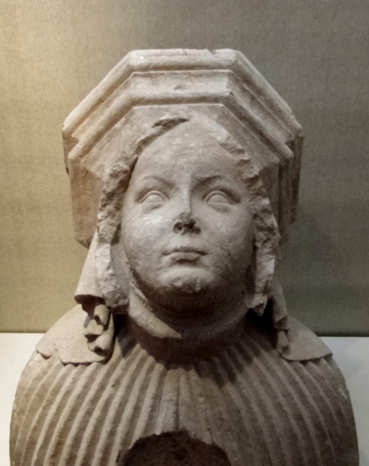 Konsolbüste (Frau Busmann) der Busmannkapelle der Sophienkirche in Dresden, derzeit im Stadtmuseum (Fotografie mit Fotoerlaubnis)